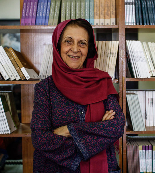 منصوره اتحادیه